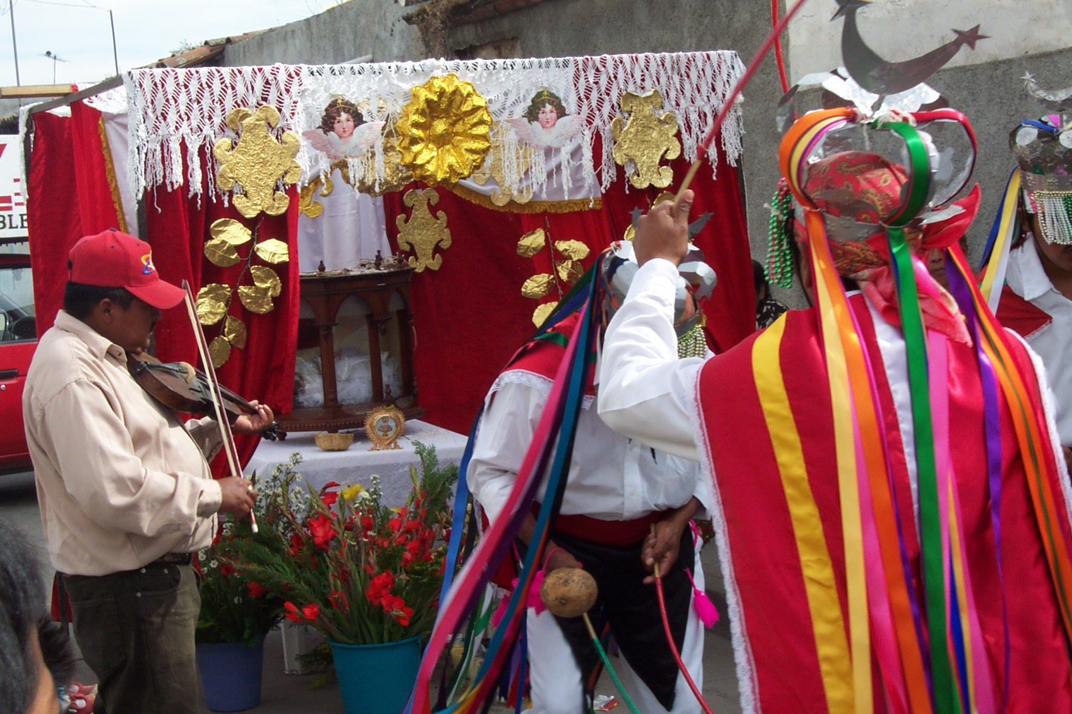 La danza de los Moritos de Tuxpan, Jalisco